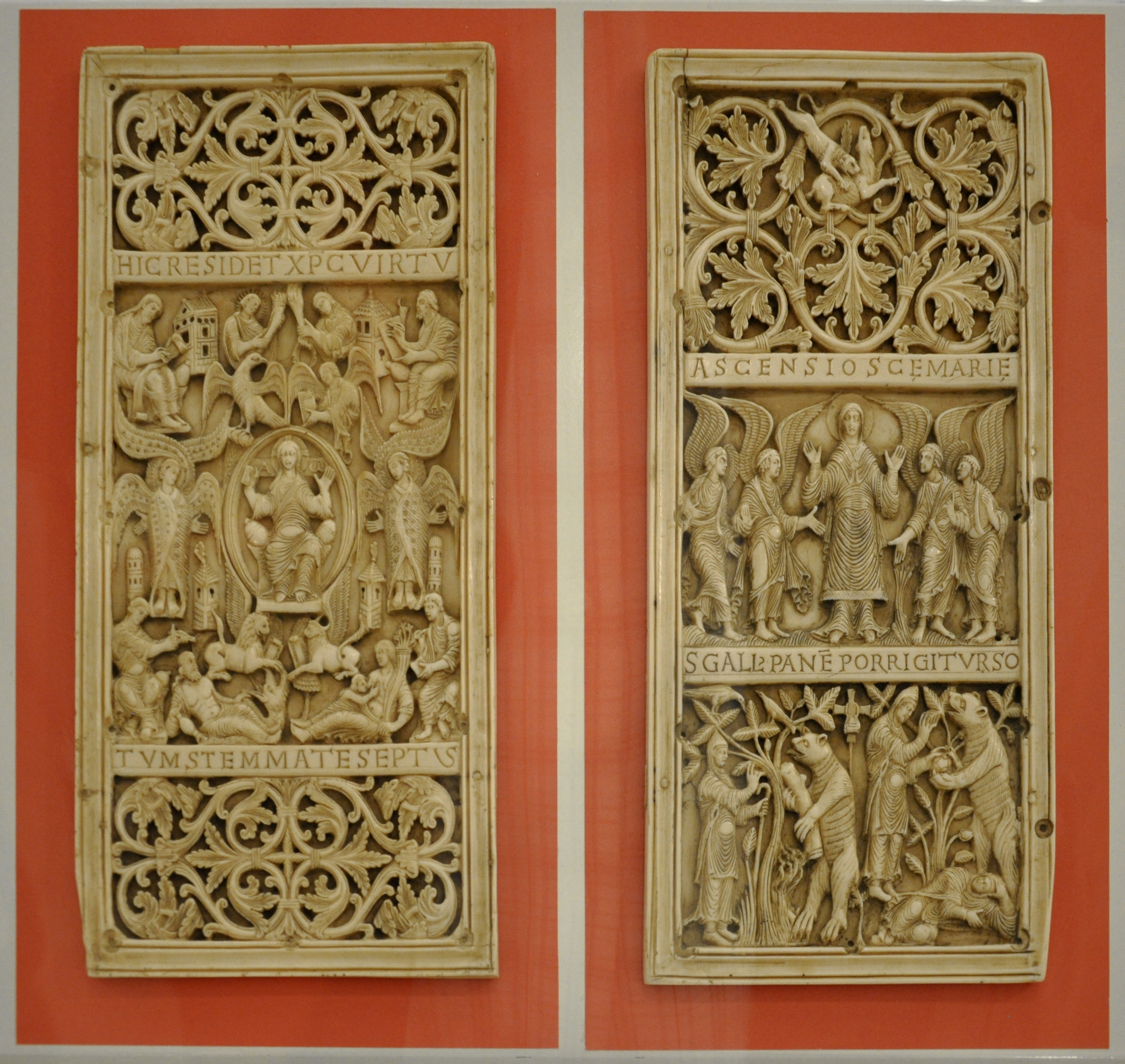 St. Gallen, Lapidarium, Ausstellung "Die Kultur der Abtei St. Gallen", Kopie der Tuotilotafeln vom "Evangelium longum", Cod Sang. 53